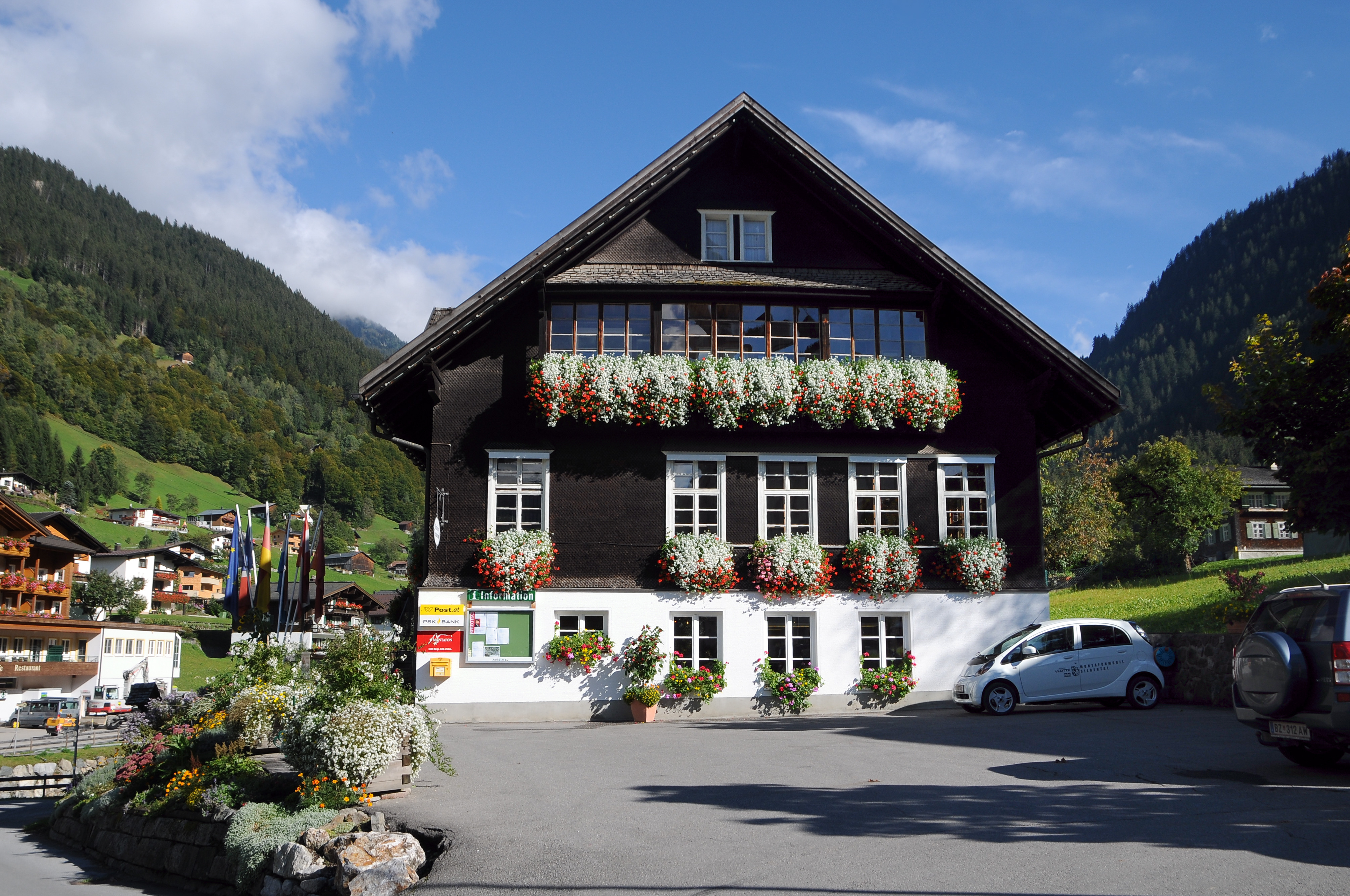 Das Gemeindeamt und Montafoner Bergbaumuseum im Ort Silbertal steht im Gegenüber der Pfarrkirche Silbertal.